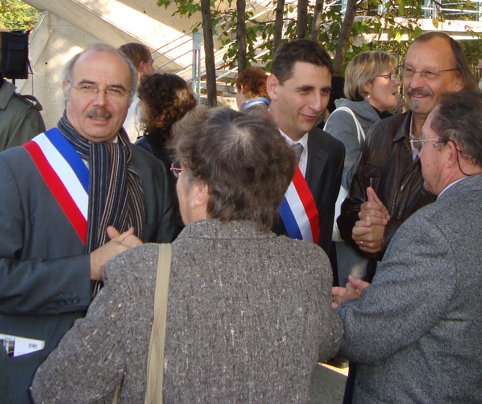 Version recadrée de File:17octABJSDidierDaenickx2.jpg